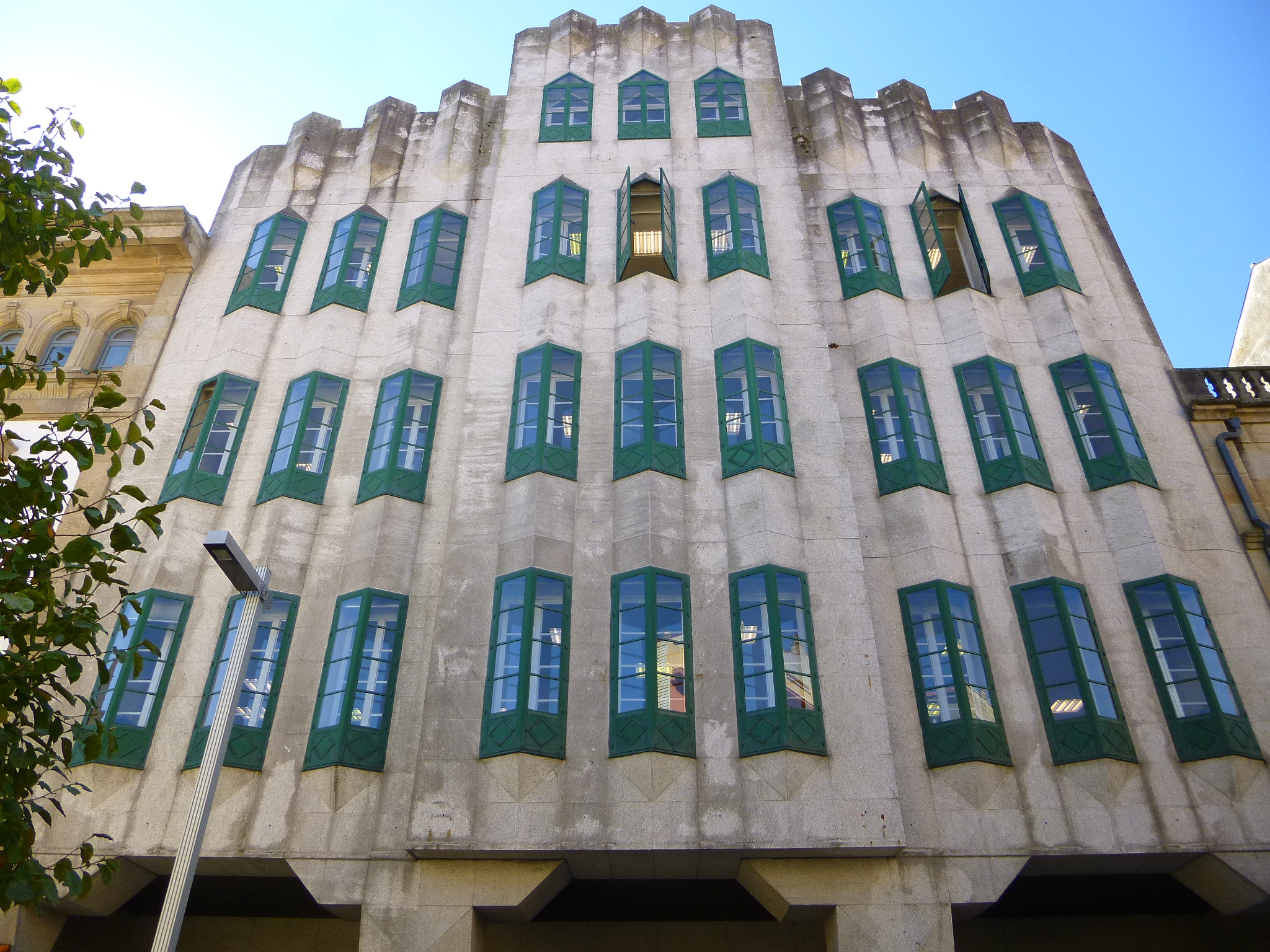 Biblioteca Pública del Estado de Pontevedra